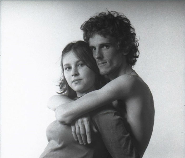 Luis Alberto Spinetta y Patricia Salazar.